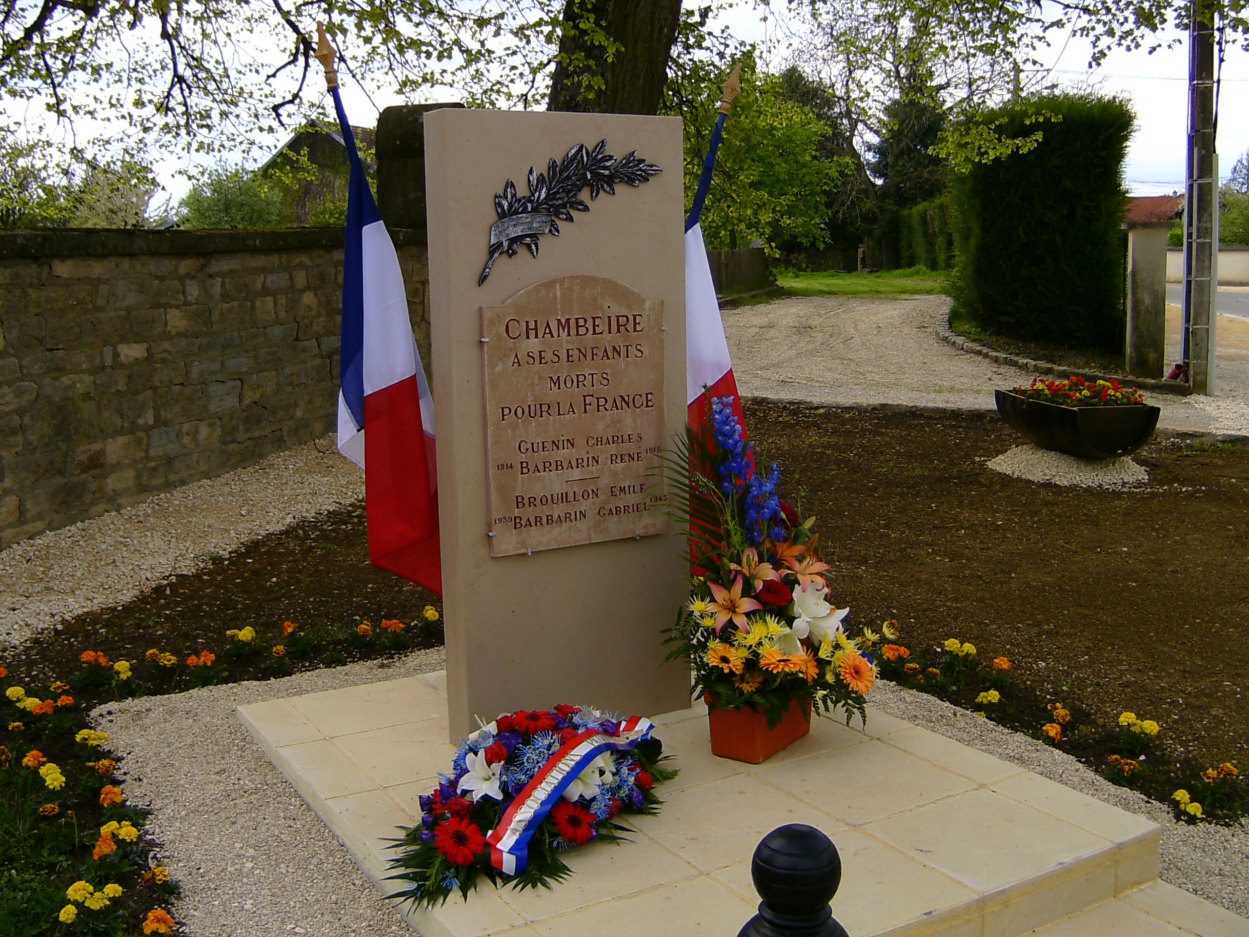 Le monument aux morts de Chambeire à côté de l'église.